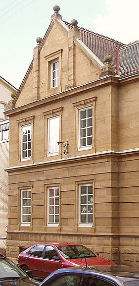 Heilbronn